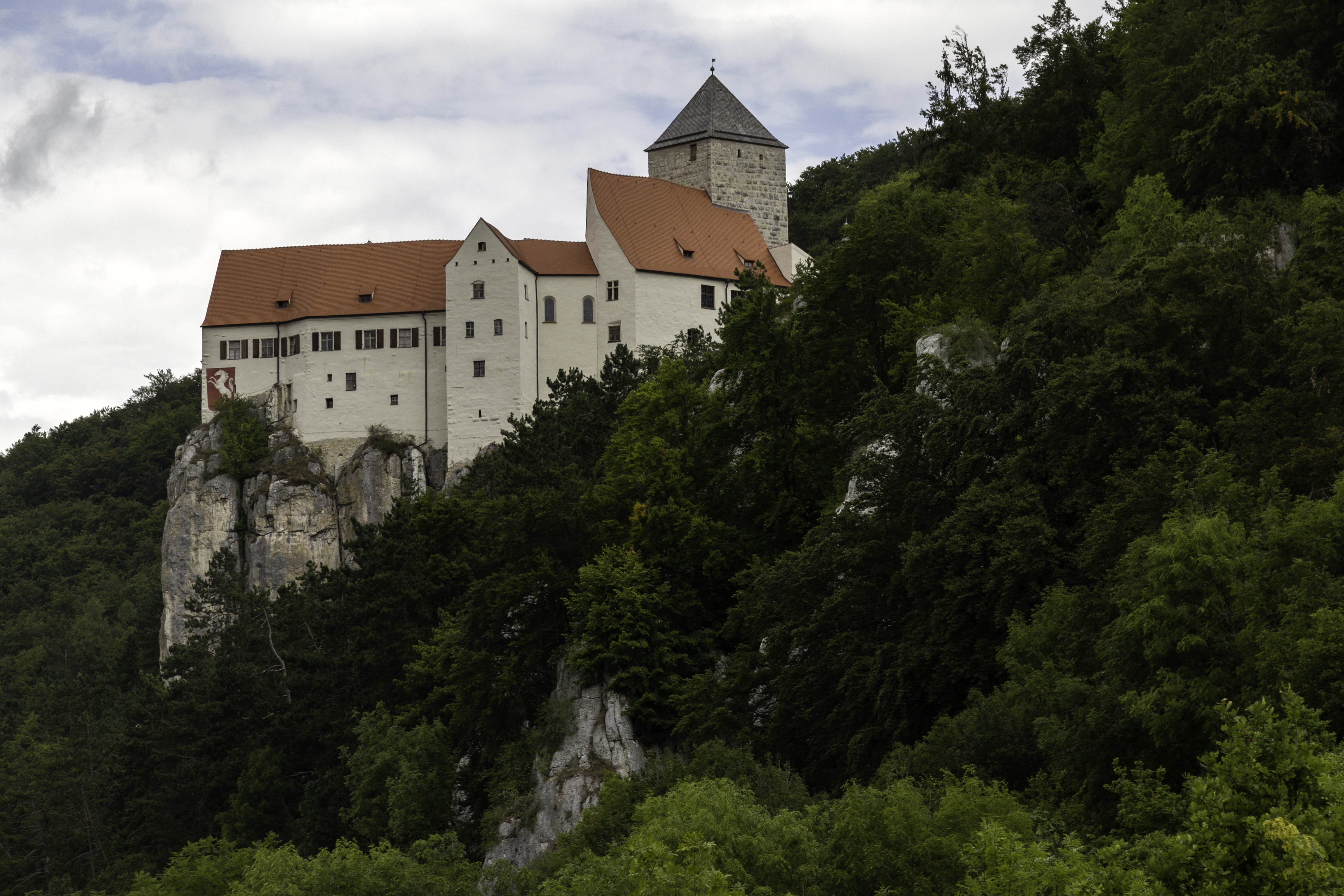 Burg Prunn, Riedenburg, Nusshausen